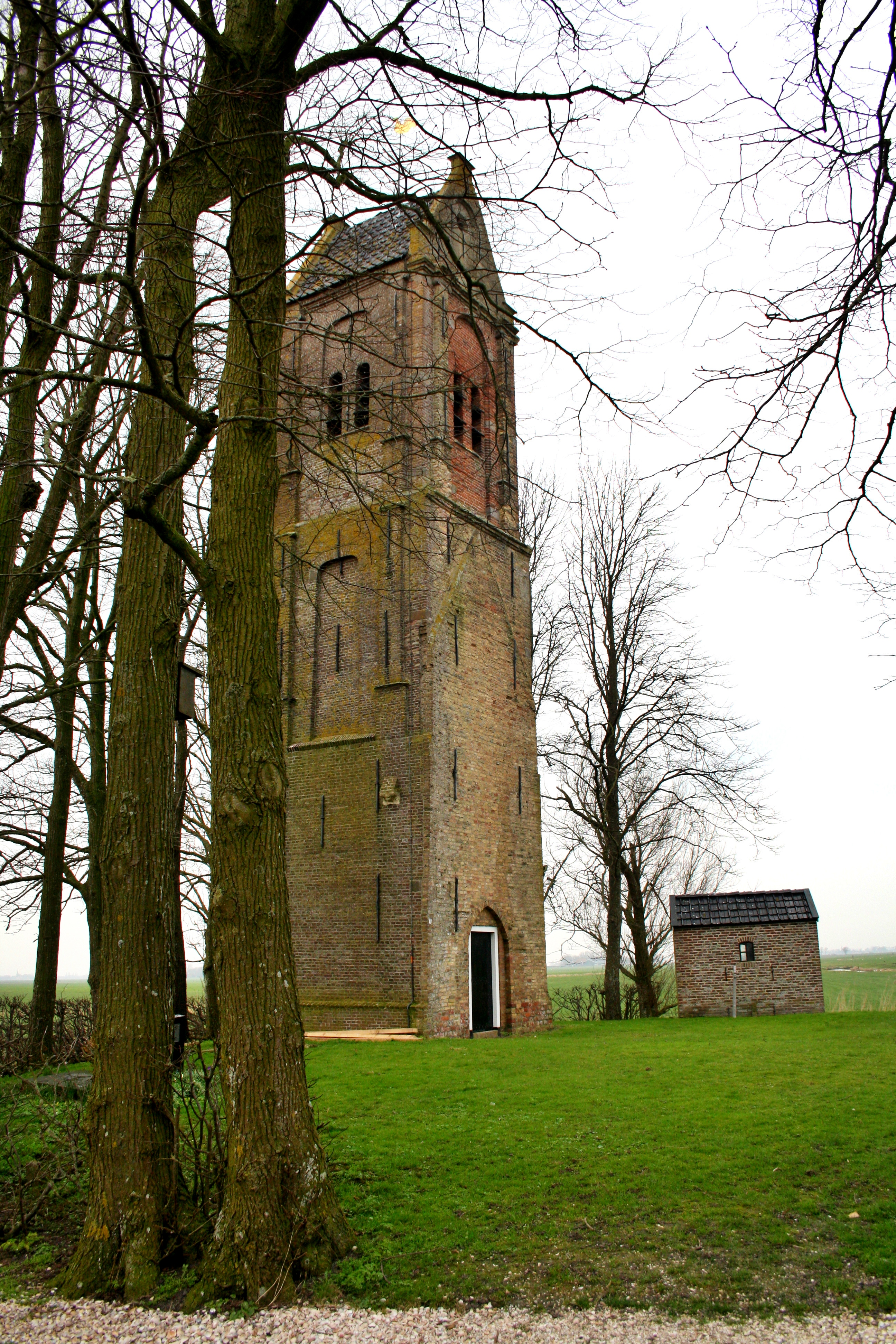 Toren van de in 1880 gesloopte NH kerk in Schillaard